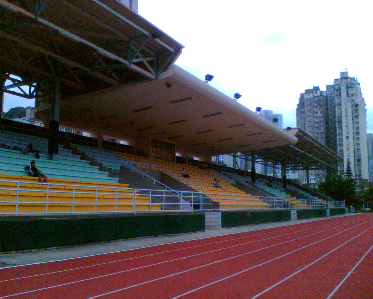 葵青區葵涌運動場